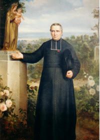 Peinture d'Hélène Feillet datée d'octobre 1868 et représentant le Père Cestac